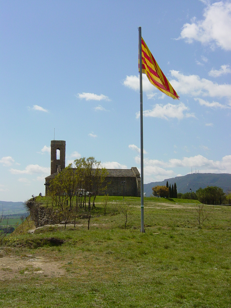 Foto de Sant Andreu del Castell de Tona